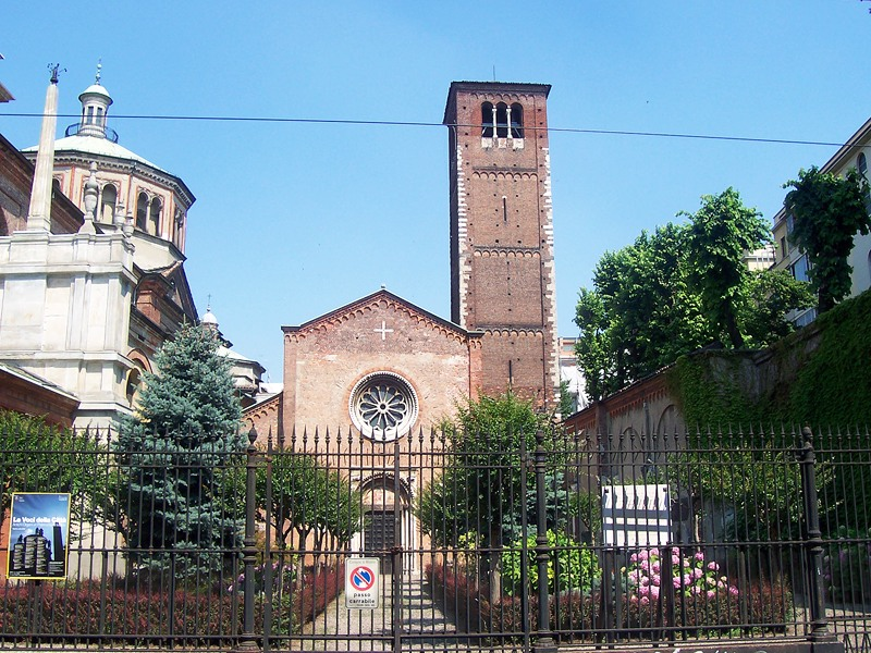 Milano - Chiesa di S. Celso